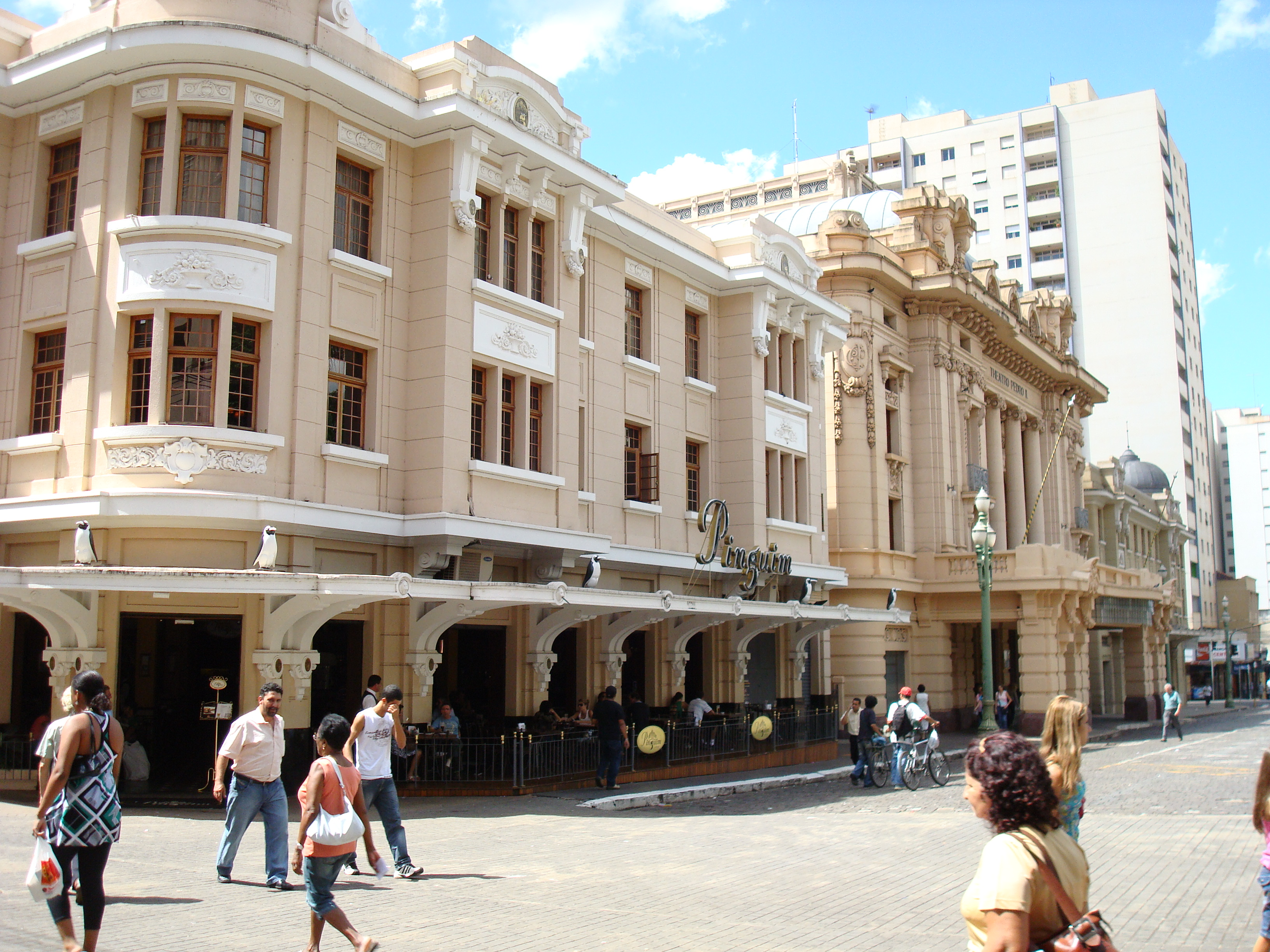 Fotografia do Pinguim (Ribeirão Preto) ao lado do Teatro Pedro II